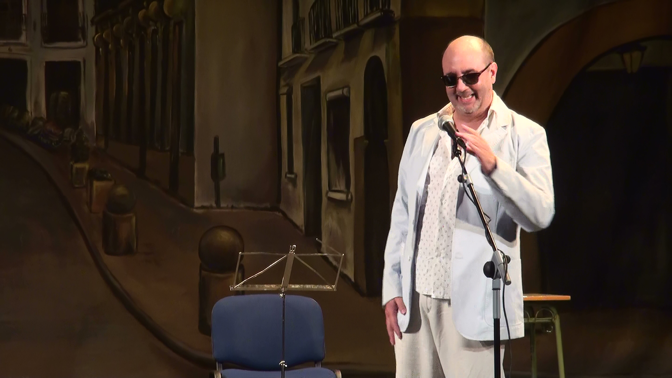 Vivu la teatro! Manuel Pancorbo prezentas monologon